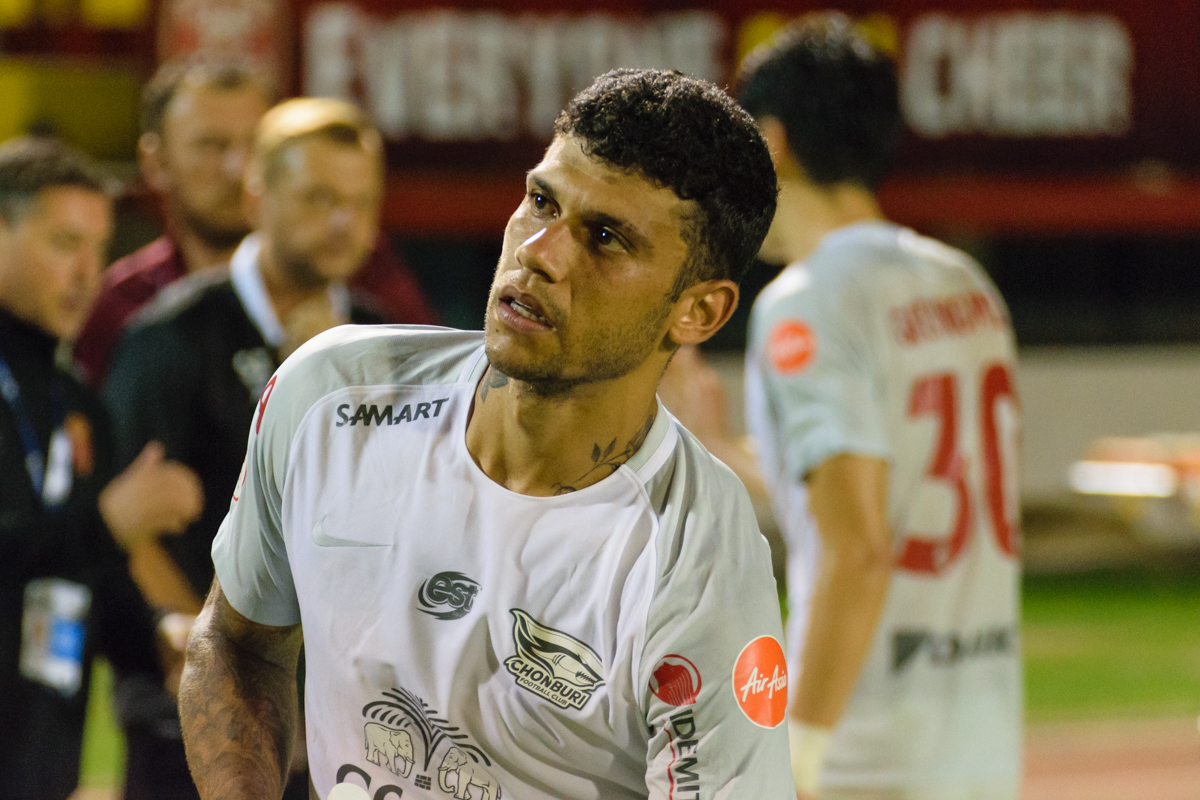 Ciro Henrique Alves Ferreira e Silva